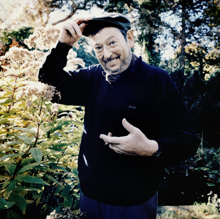 Ulrich Schamoni 1997 in seinem Garten in Berlin